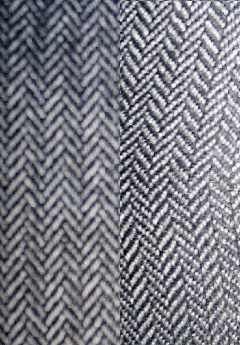 Stretchgewebe, rechte Hälfte in Querrichtung gespannt